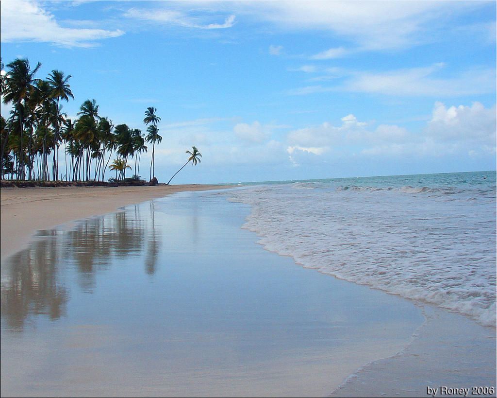 lugares secretos (dezenas de quilometros a pe entre pequenas cidades litoraneas)andando pelo nordeste